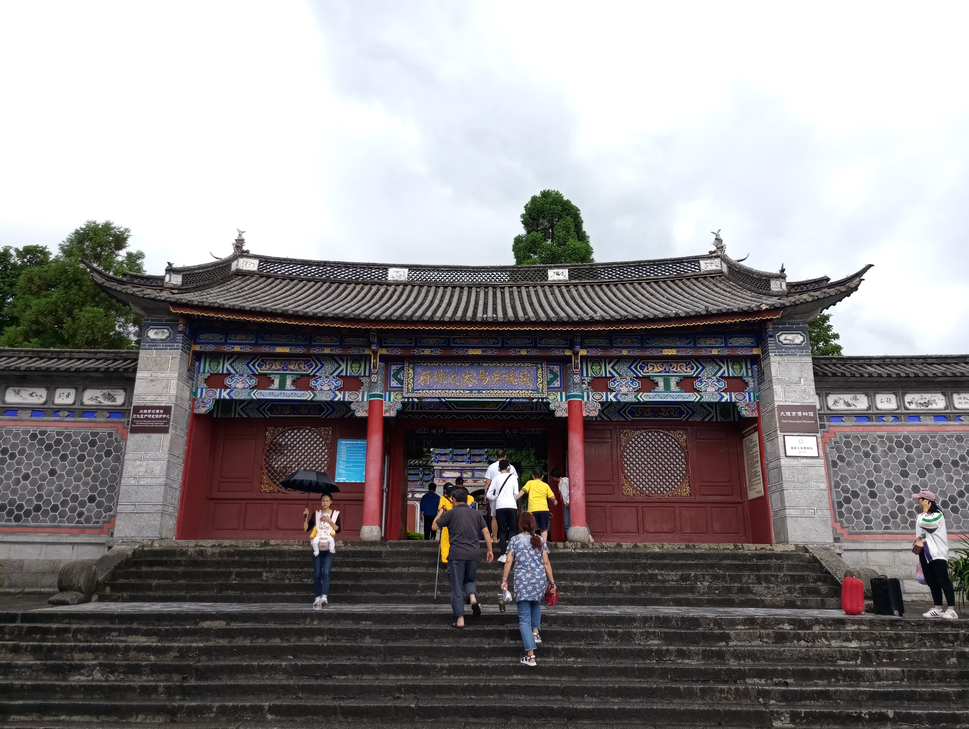 中文（中国大陆）: 大理市博物馆